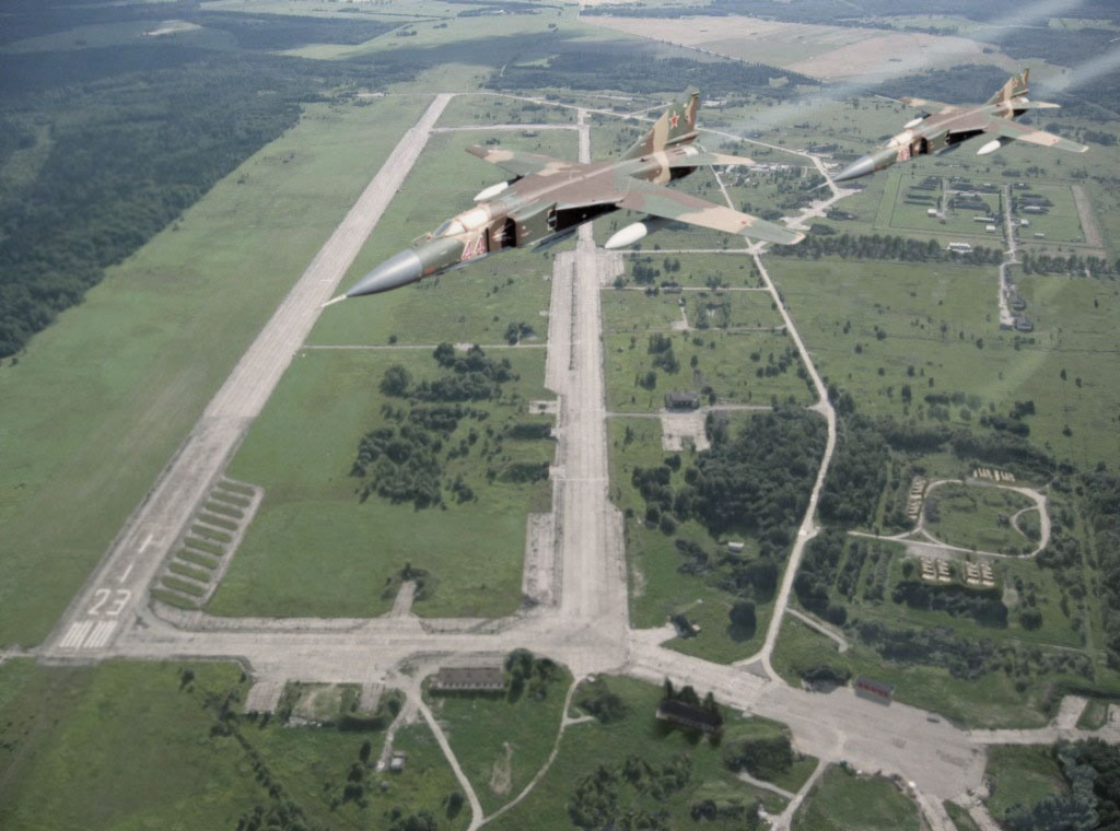 МиГ-23МЛД над лётным полем